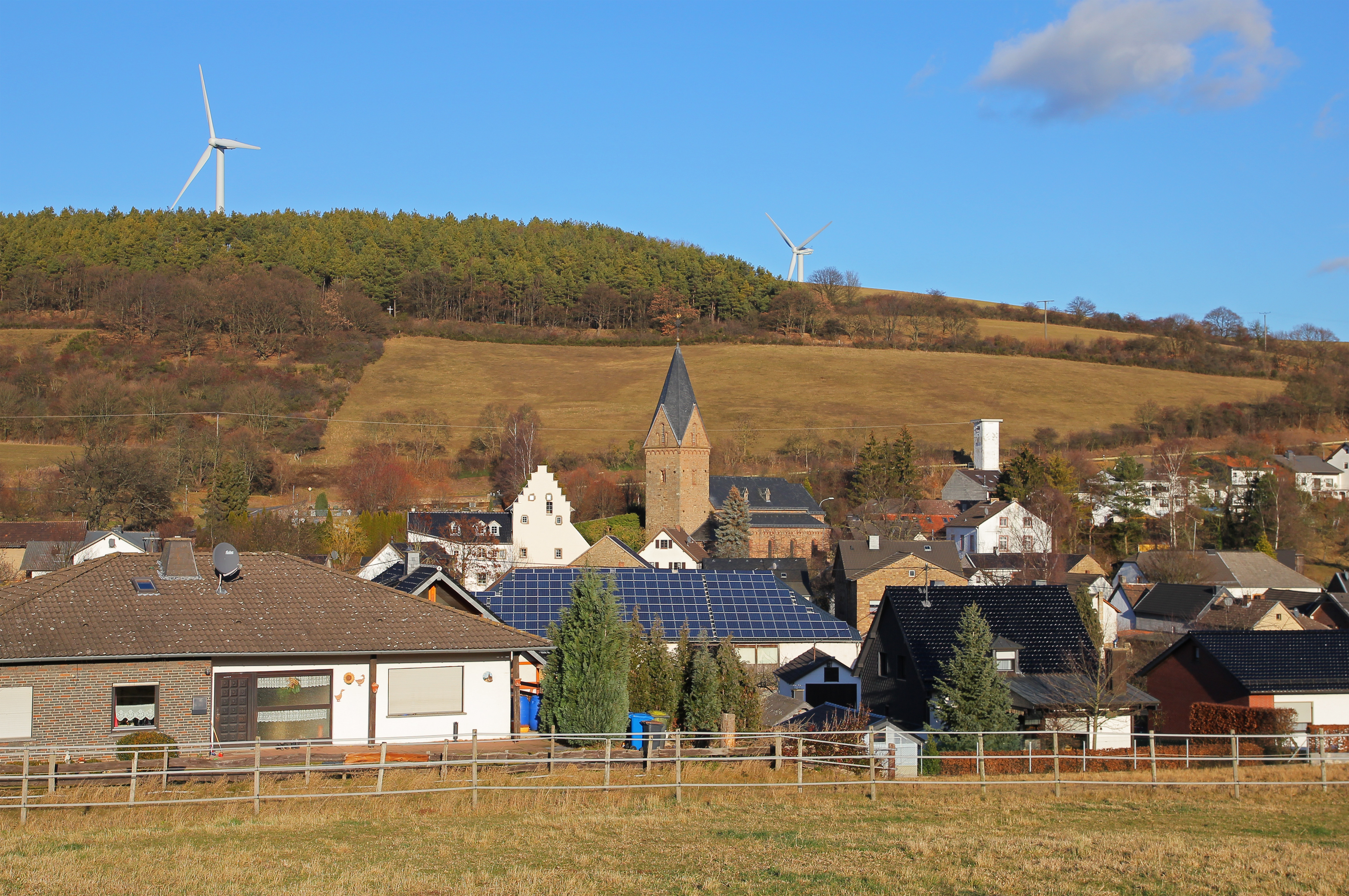 Mechernich-Kallmuth: Aussicht über das Dorf einschl. der Kirche St. Georg